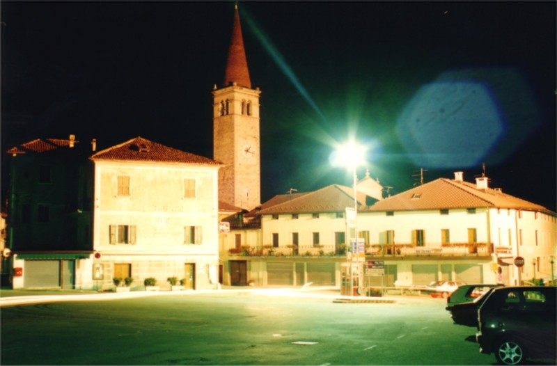 Arsiè, Italy